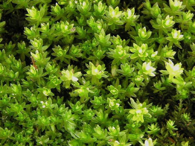 Mnium hornum in der Wolfsschlucht bei Eberbach am Neckar.